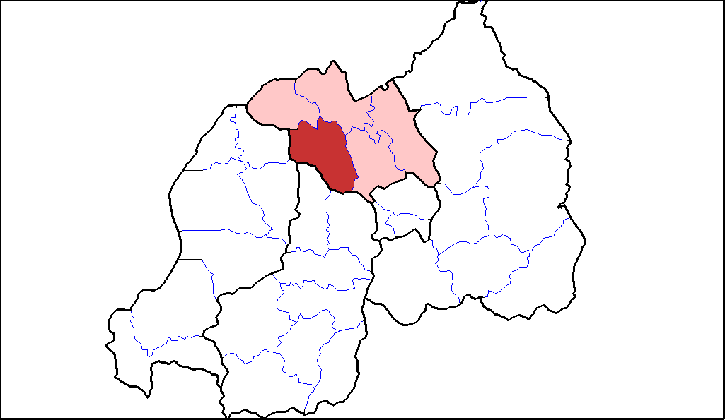 Distretto di Gakenke.